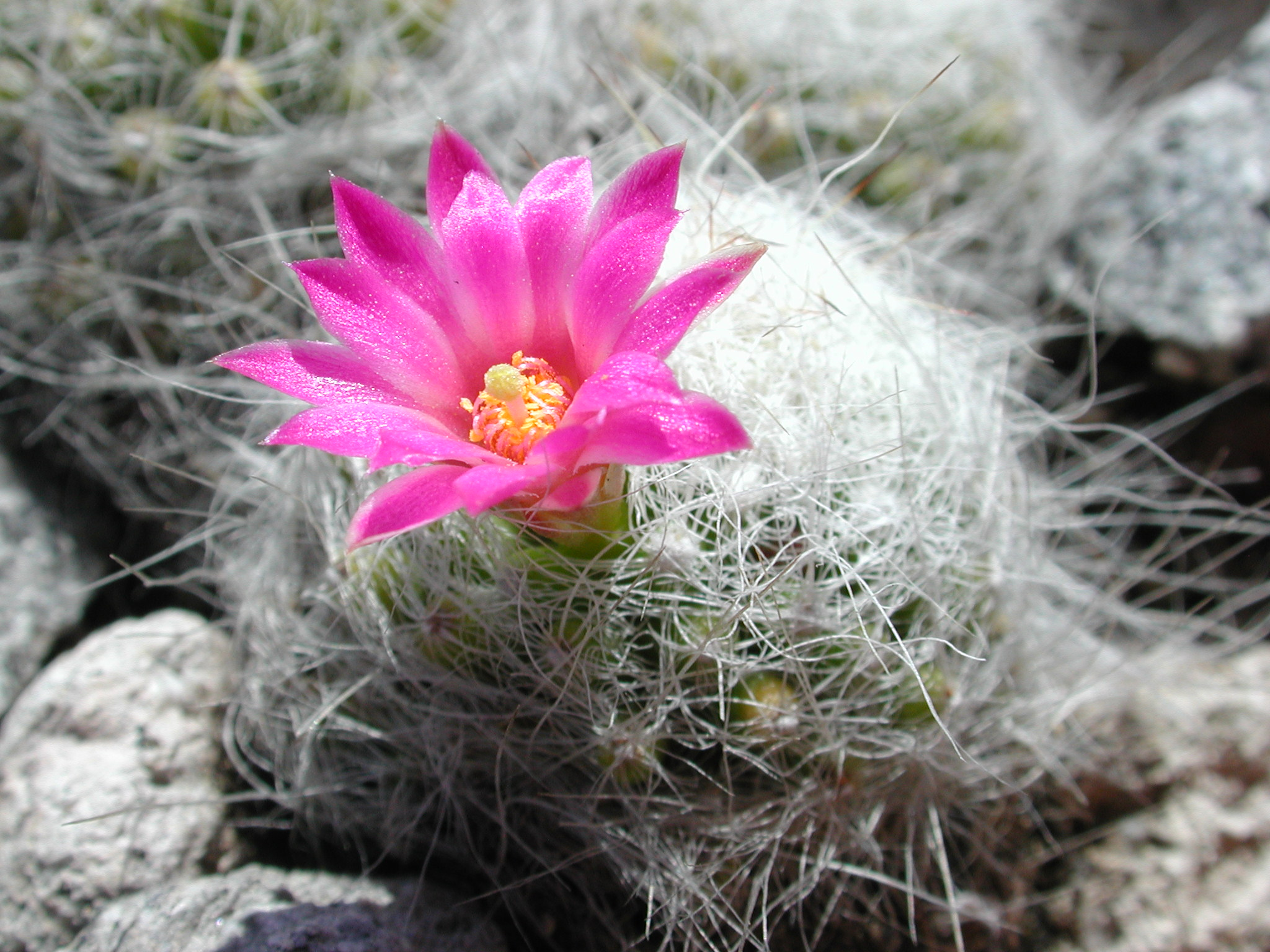 Mammillaria kraehenbuehlii in blossom.